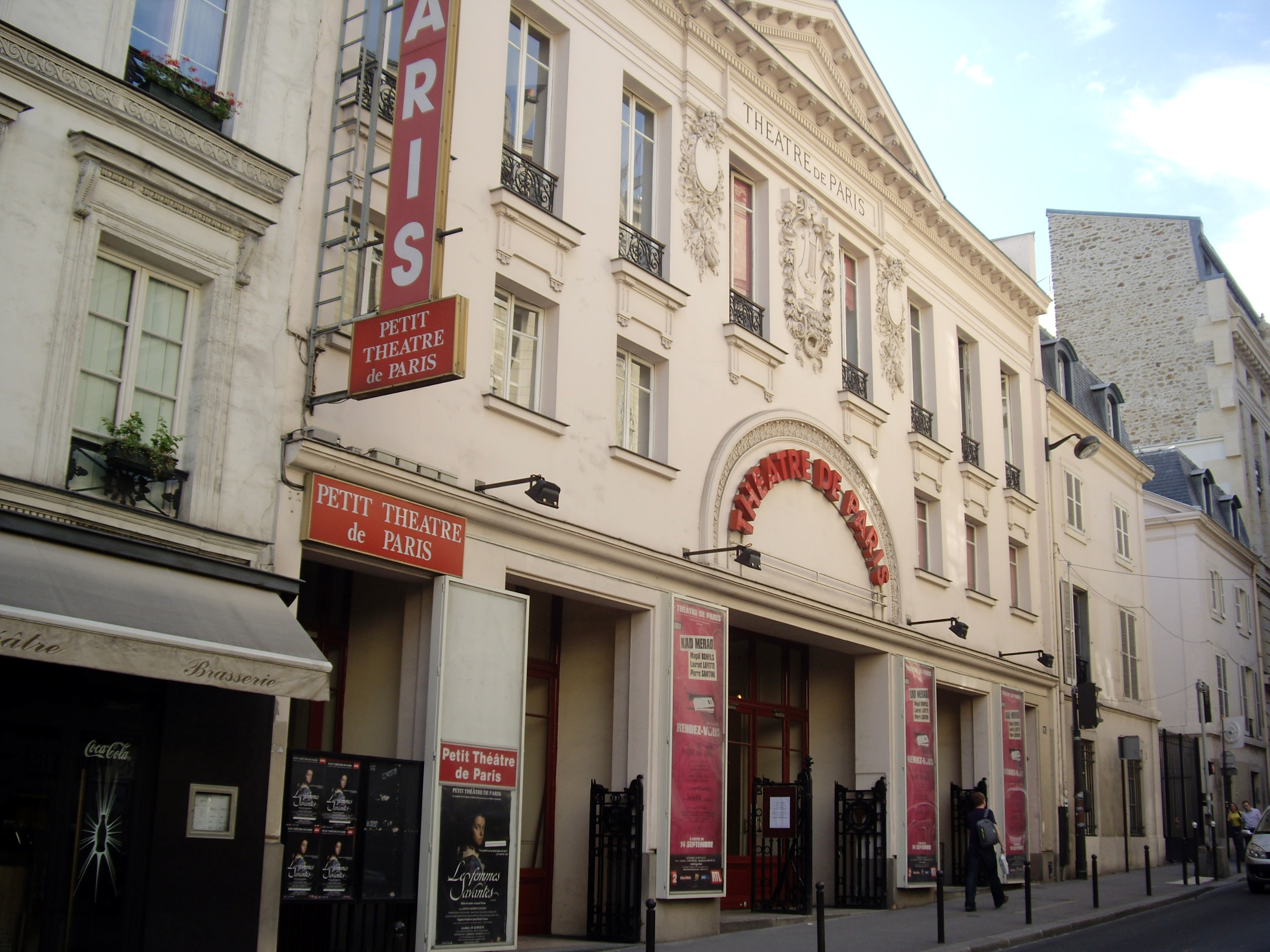 Théâtre de Paris, 15 rue Blanche, Paris 9e Object location48° 52′ 42.26″ N, 2° 19′ 53.8″ E